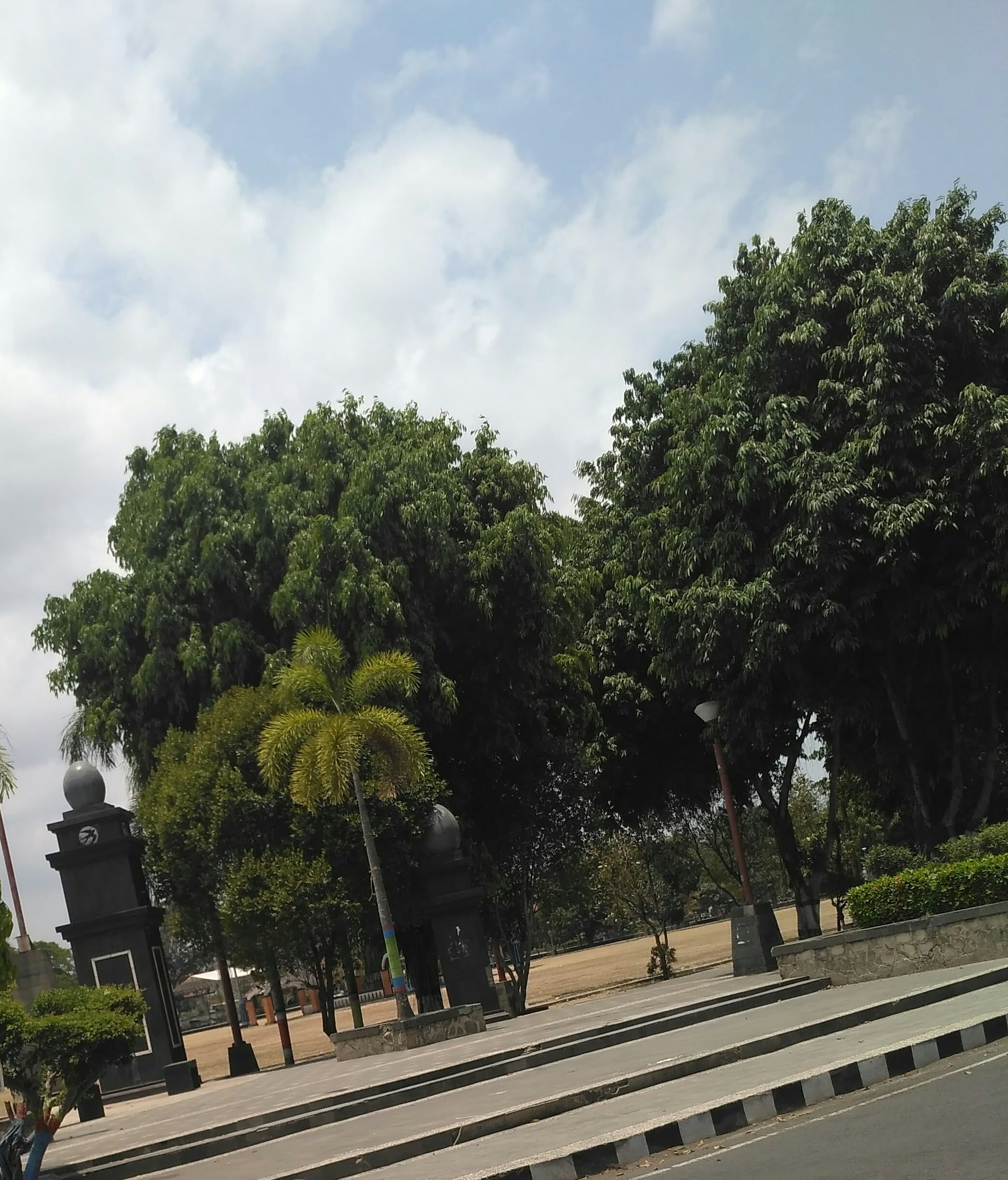 Jawa: Gambar kasebut yaiku foto alun-alun Kebumen saka pinggir. Kebumen menika salah sawijining kabupaten ana ing Kabupaten Kebumen, Jawa Tengah, Indonesia.